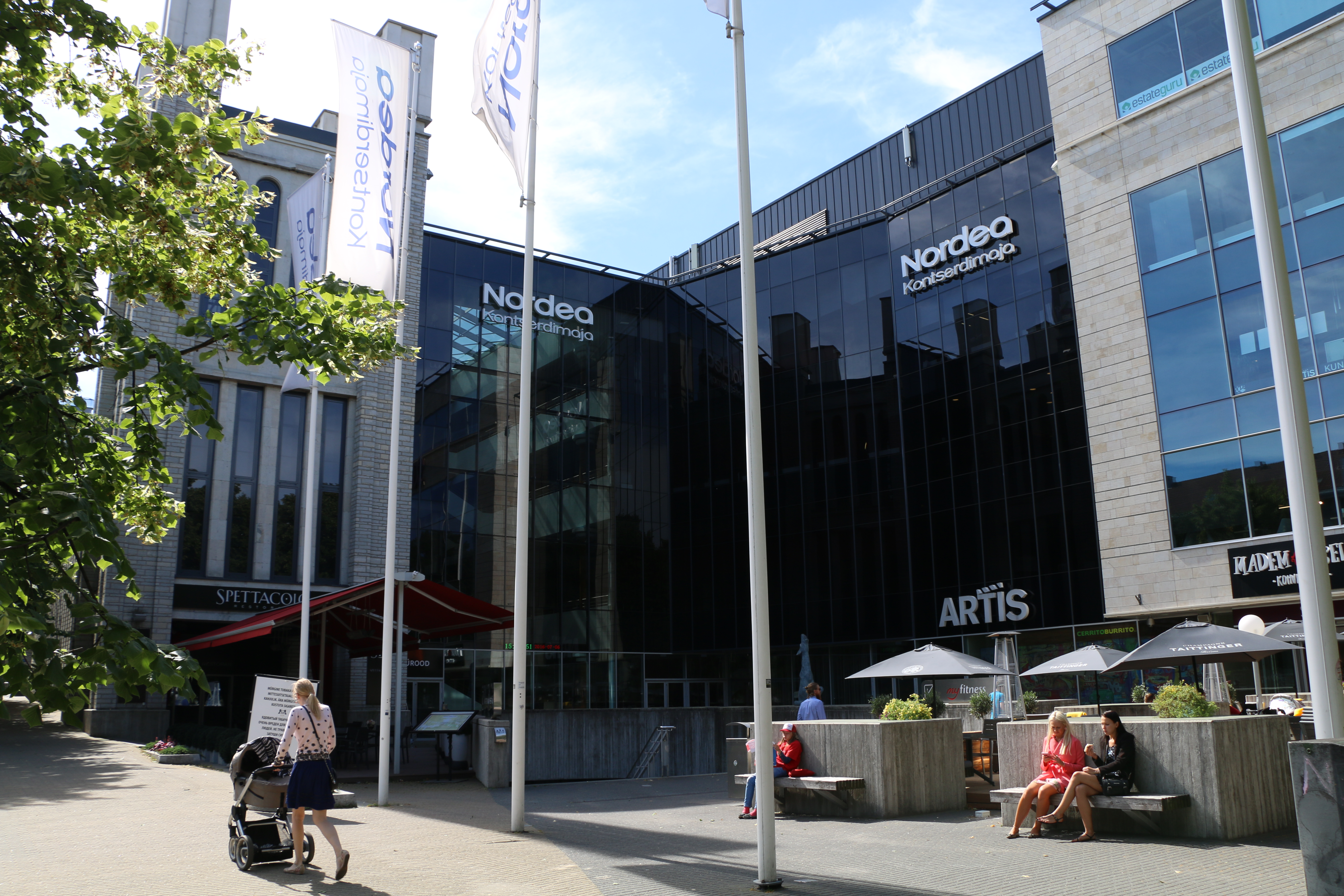 Nordea kontserdimaja ja Solarise keskuse sissepääs